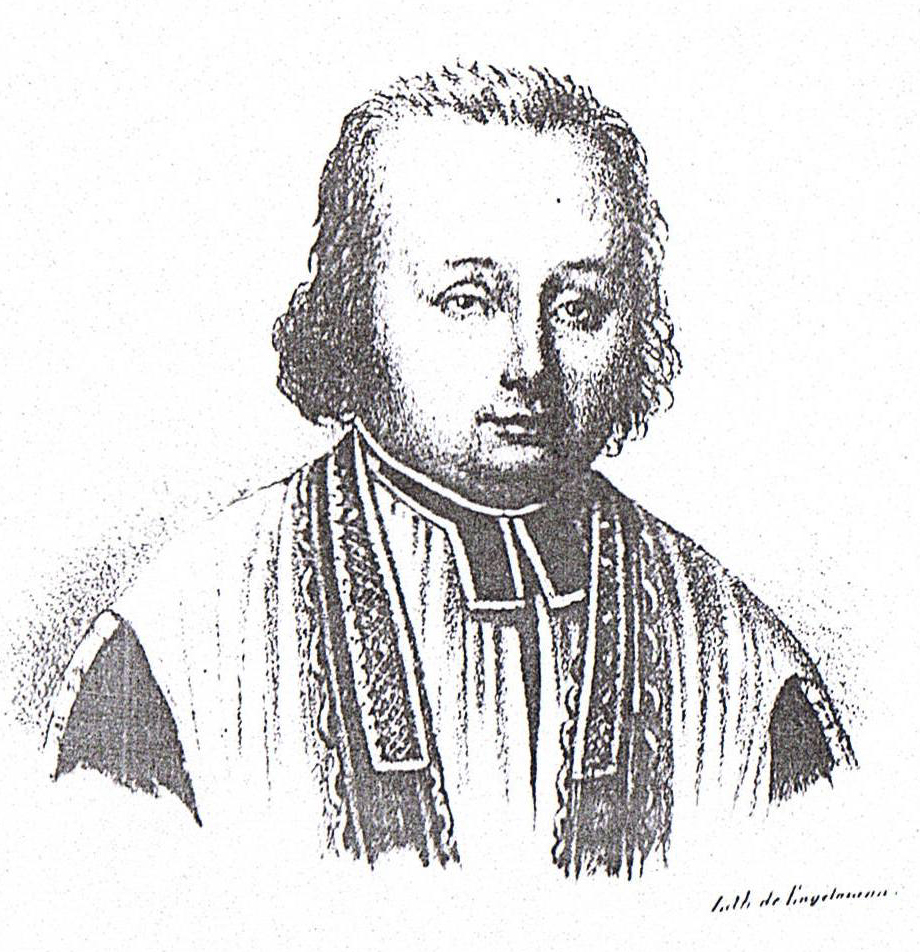 Gravure de L'abbé Manet présente au début de son ouvrage "état actuel et ancien des environs de Saint-Malo"